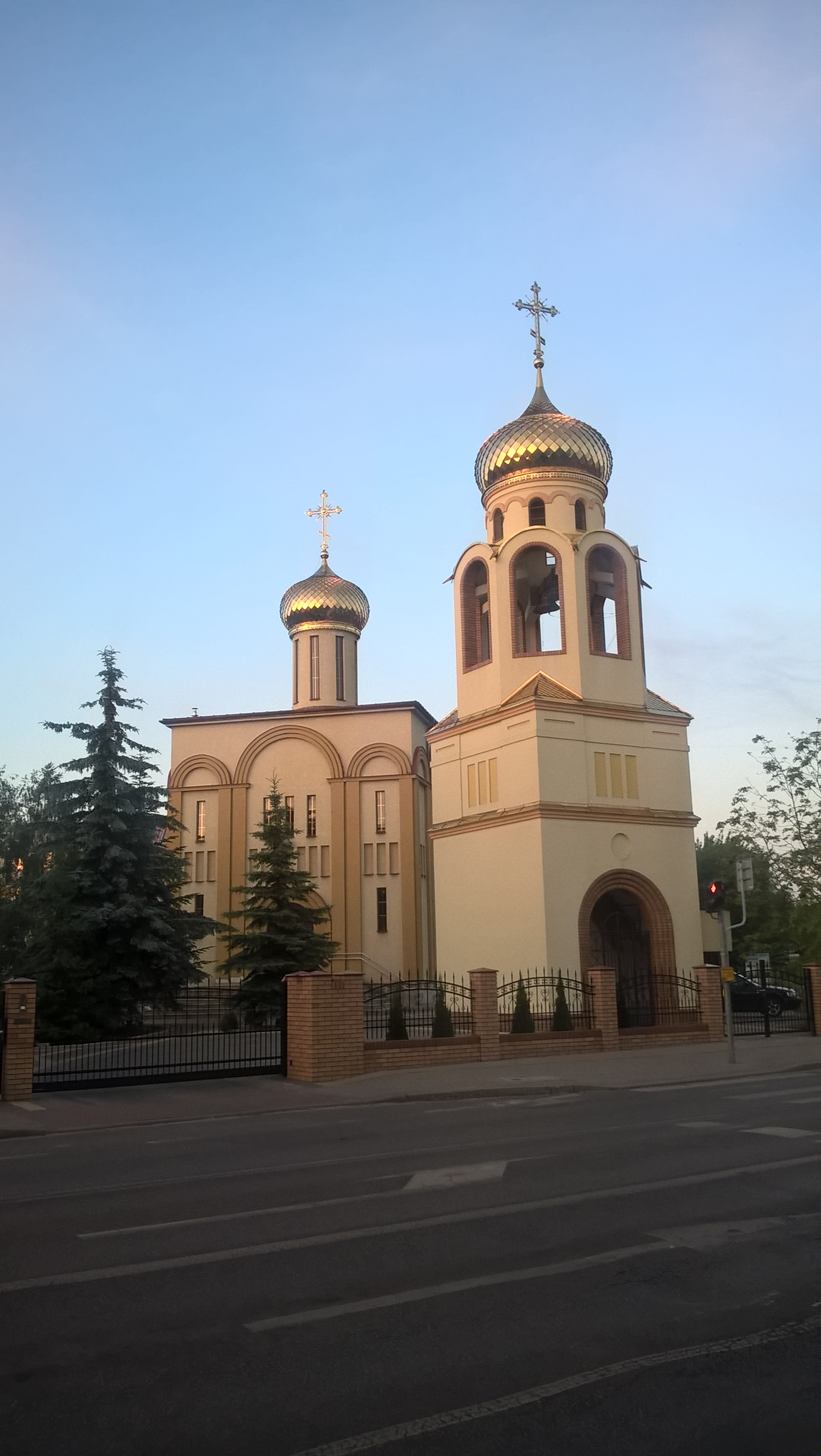 Cerkiew Trójcy Świętej w Siedlcach